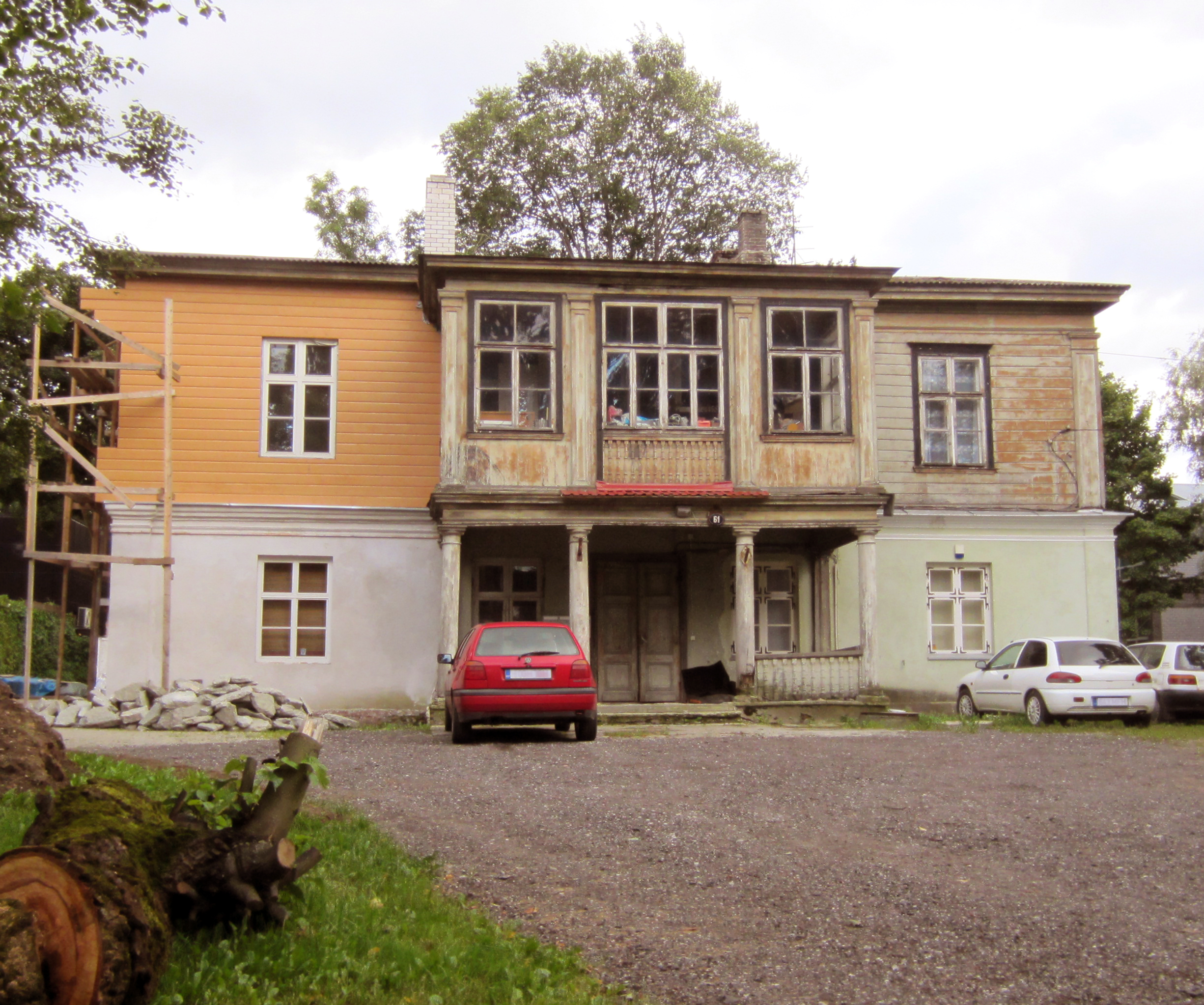 Cederhilm'i suvemõisa peahoone ja park, 19. saj.